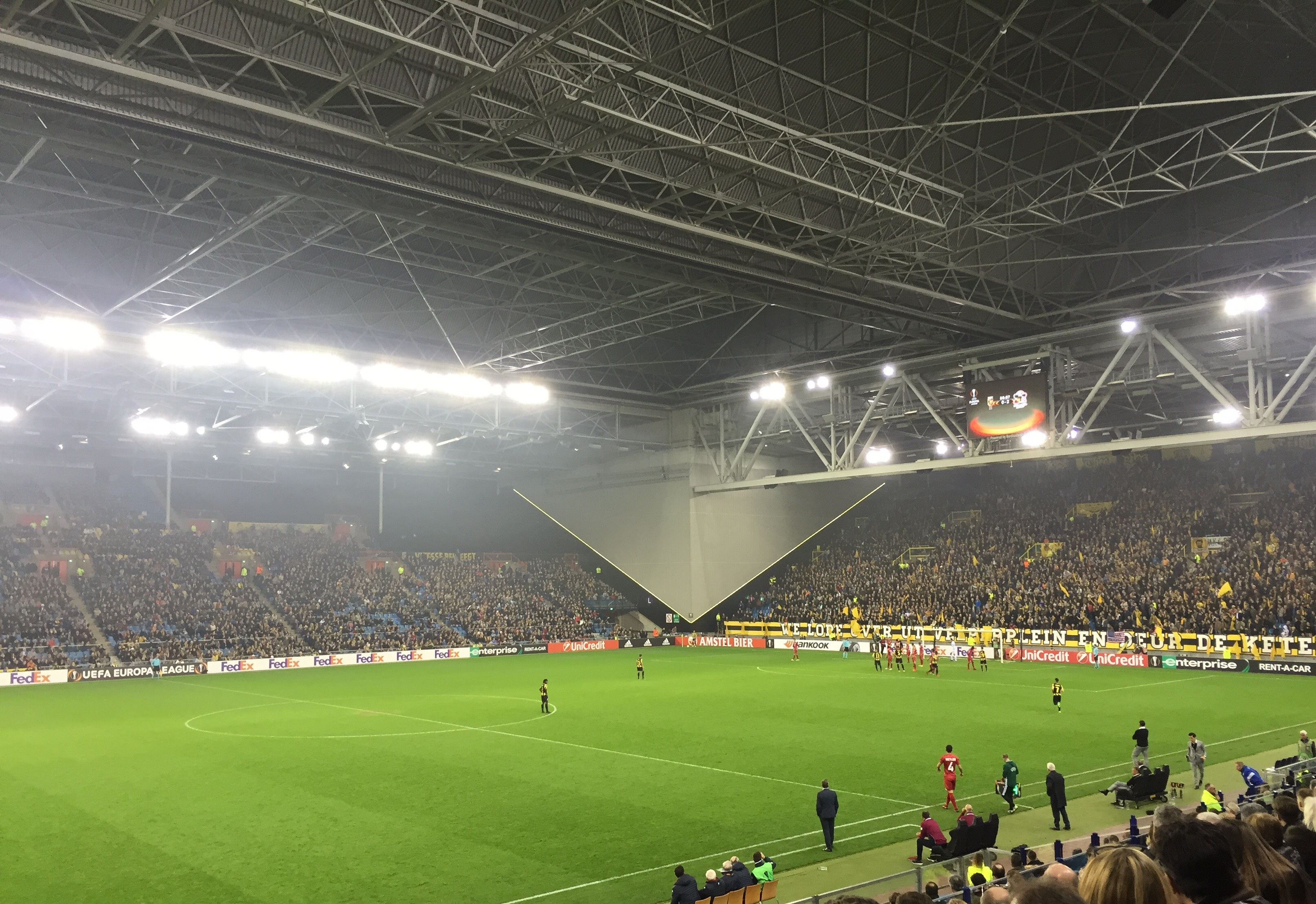 SBV Vitesse vs Zulte Waregem on 2 November 2017 at GelreDome, Arnhem